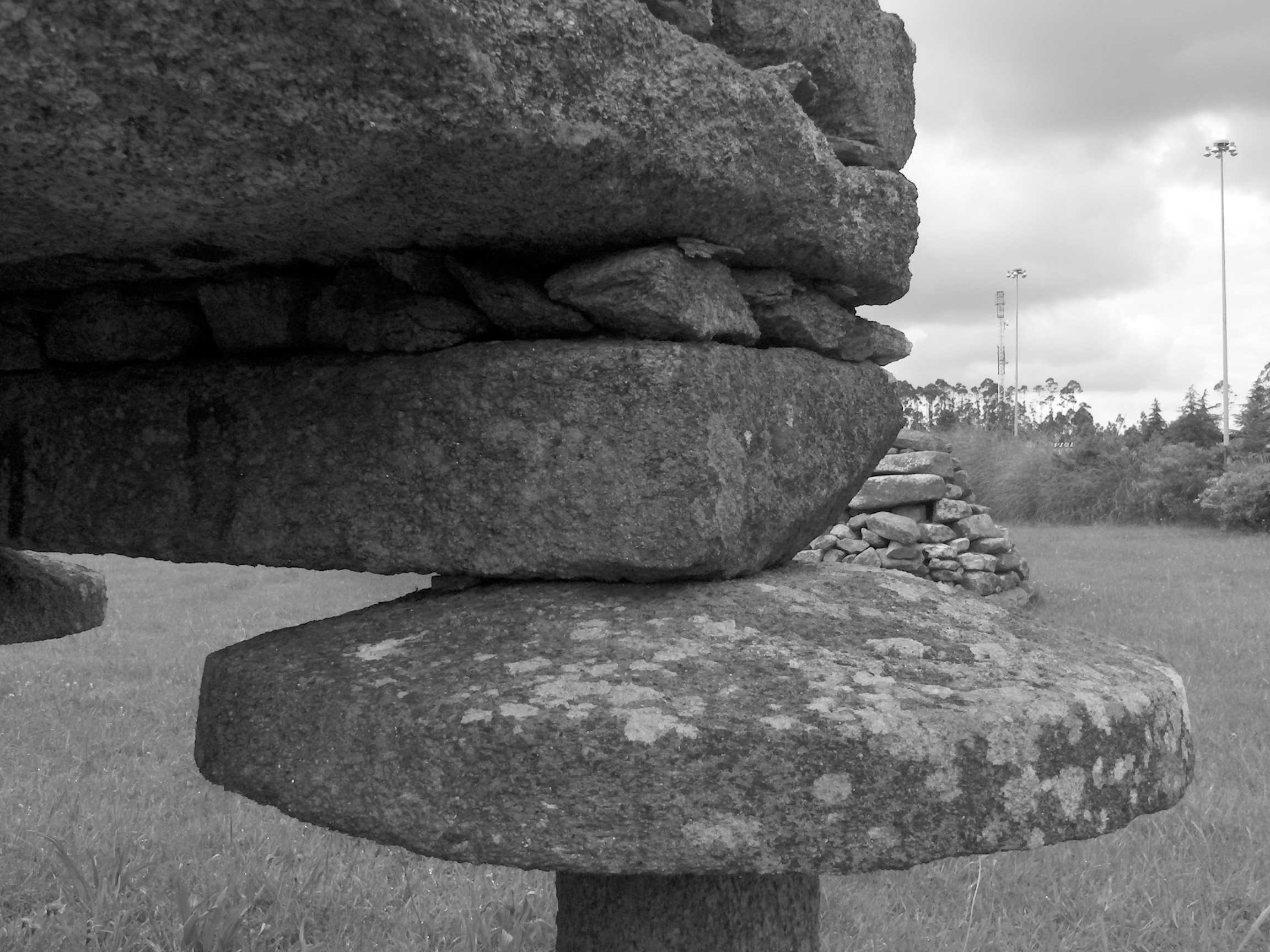 Hórreos, norte de España y Portugal, 2007